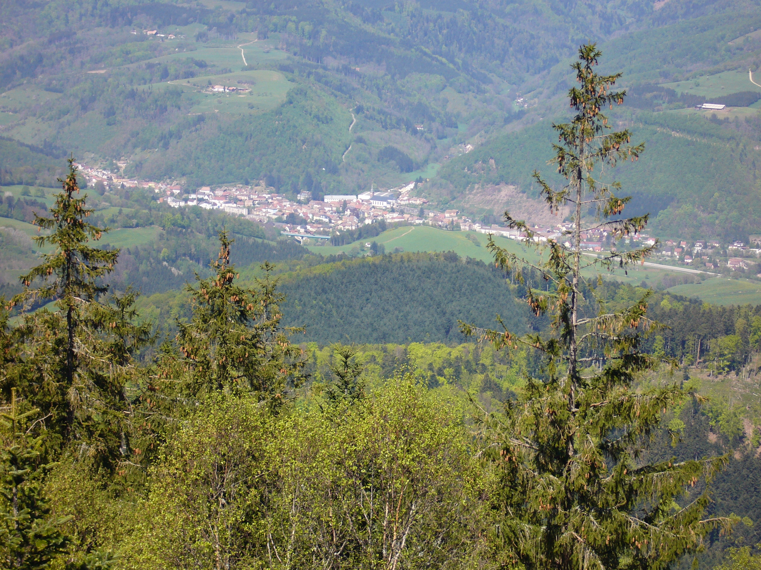 Taennchel 443.JPG